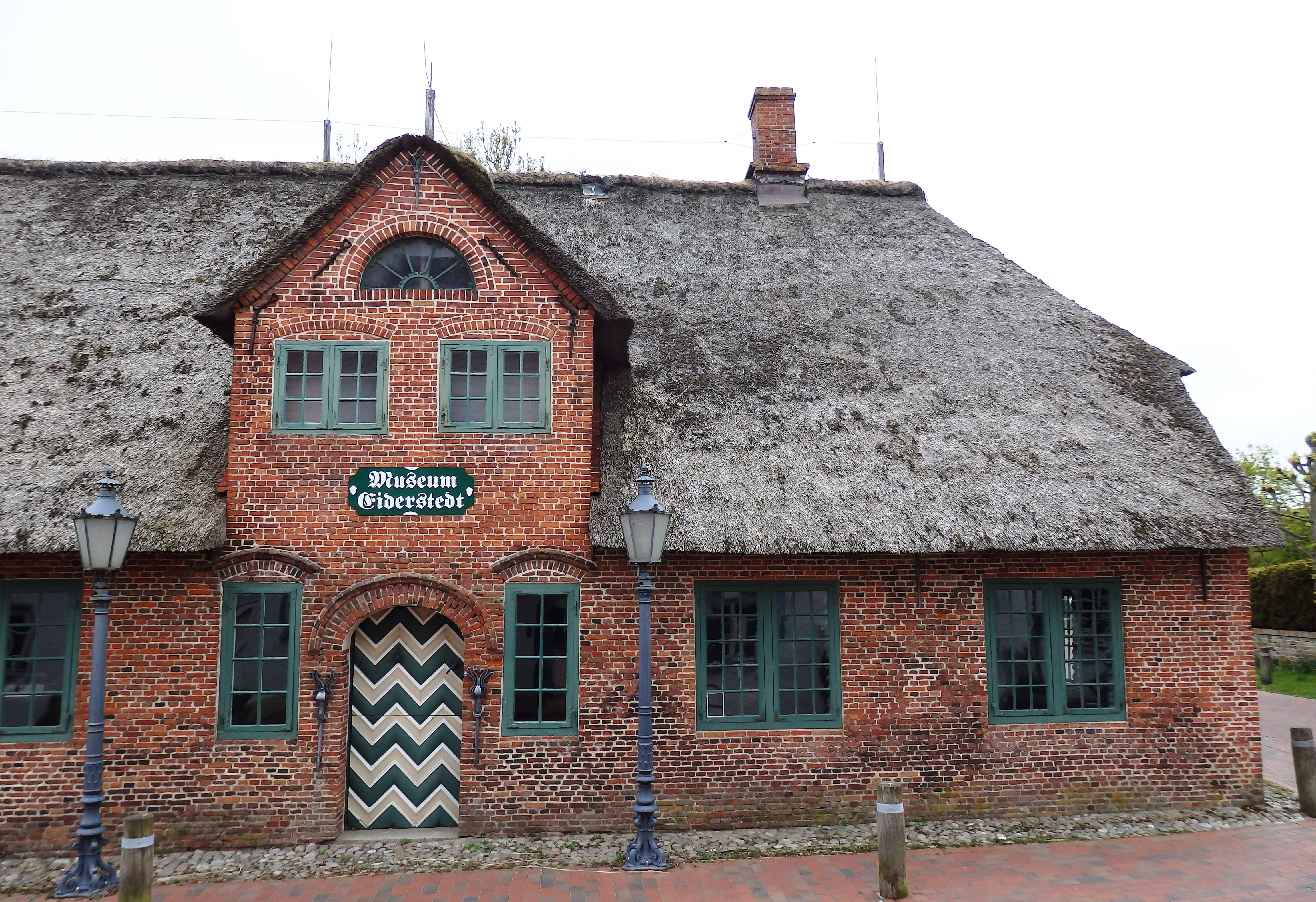 Eingang des Museums der Landschaft Eiderstedt